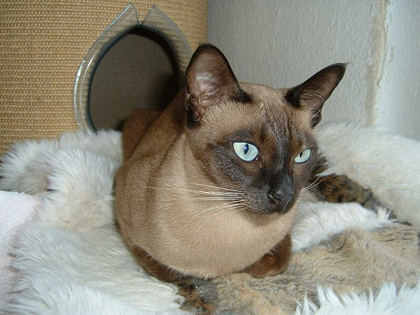 Gaya Belle von Lenné